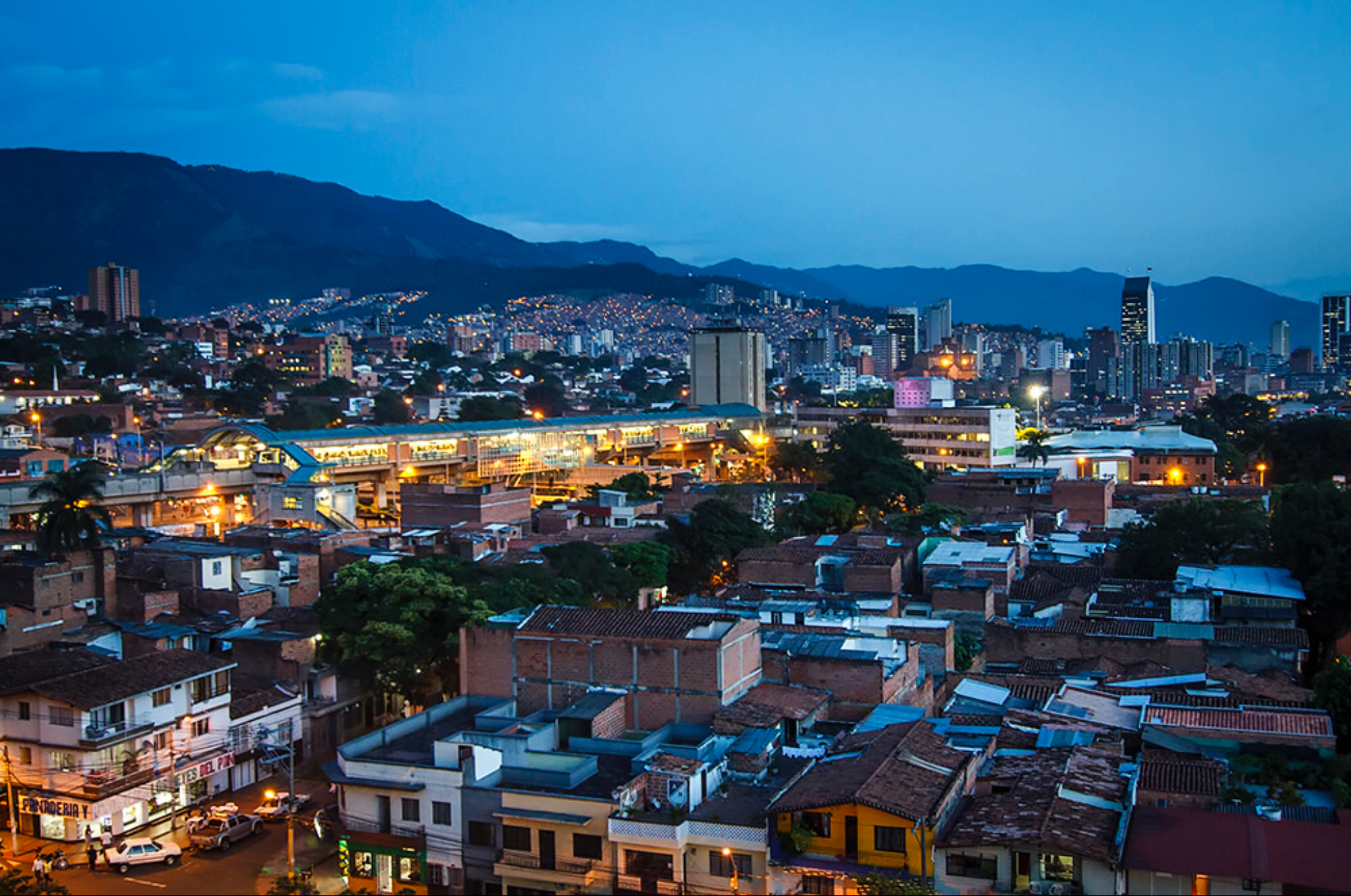 Estación Hospital (Metro de Medellín)